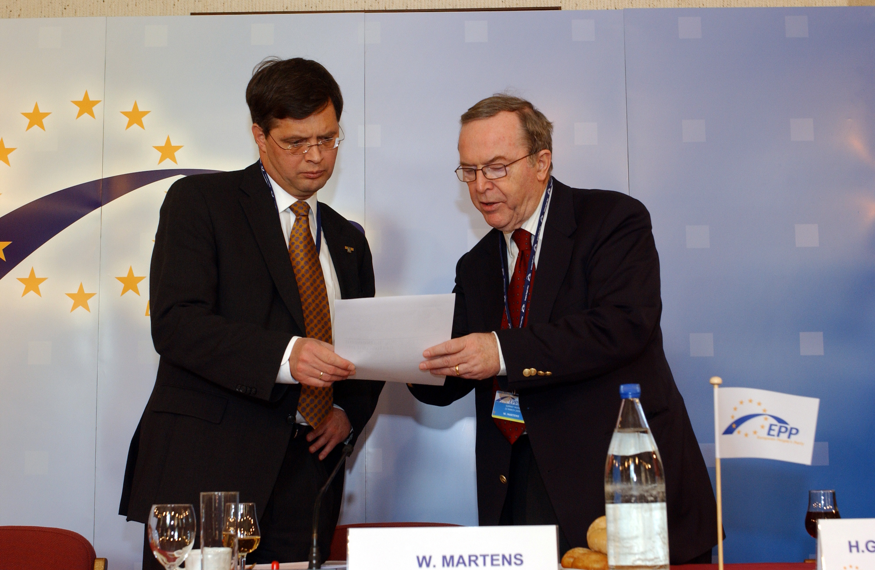 EPP Summit 23 March 2006